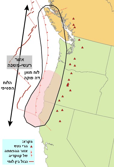 אזור ההפחתה של קסקדיה, במפגש בין הלוח הפסיפי ללוח חואן דה פוקה